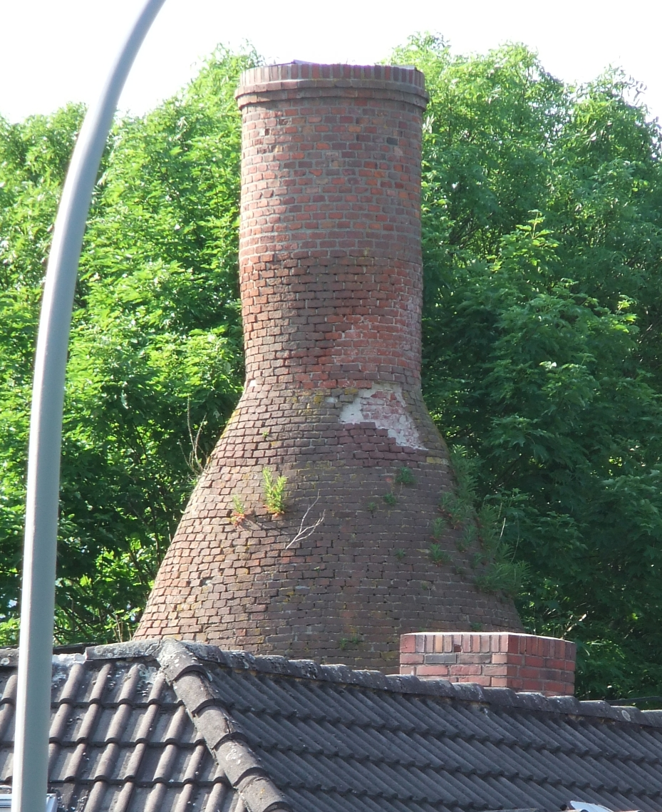 Kalkofen in Bremerhaven hinter Bütteler Straße 6. Das abgebildete Objekt ist ein geschütztes Kulturdenkmal in der Freien Hansestadt Bremen, mit der Nr. 1586 beim Landesamt für Denkmalpflege registriert.